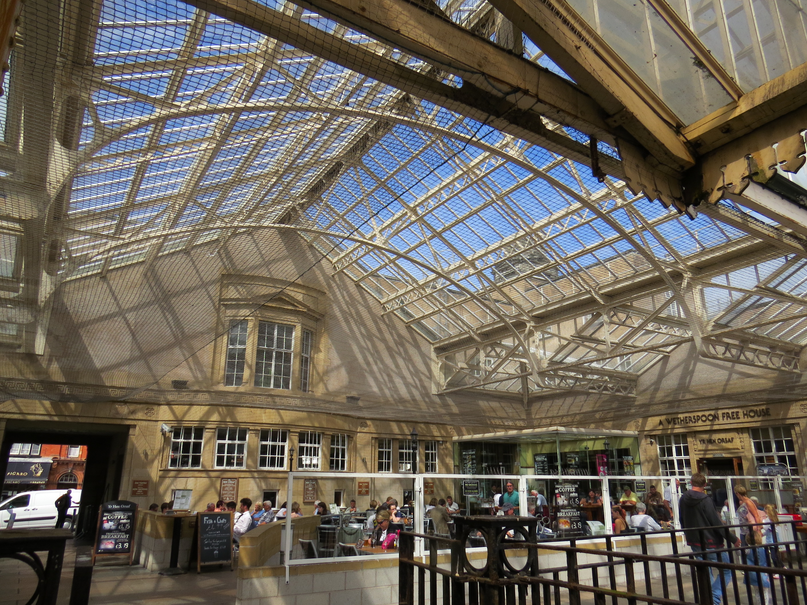 tu mewn gorsaf reilffordd Aberystwyth